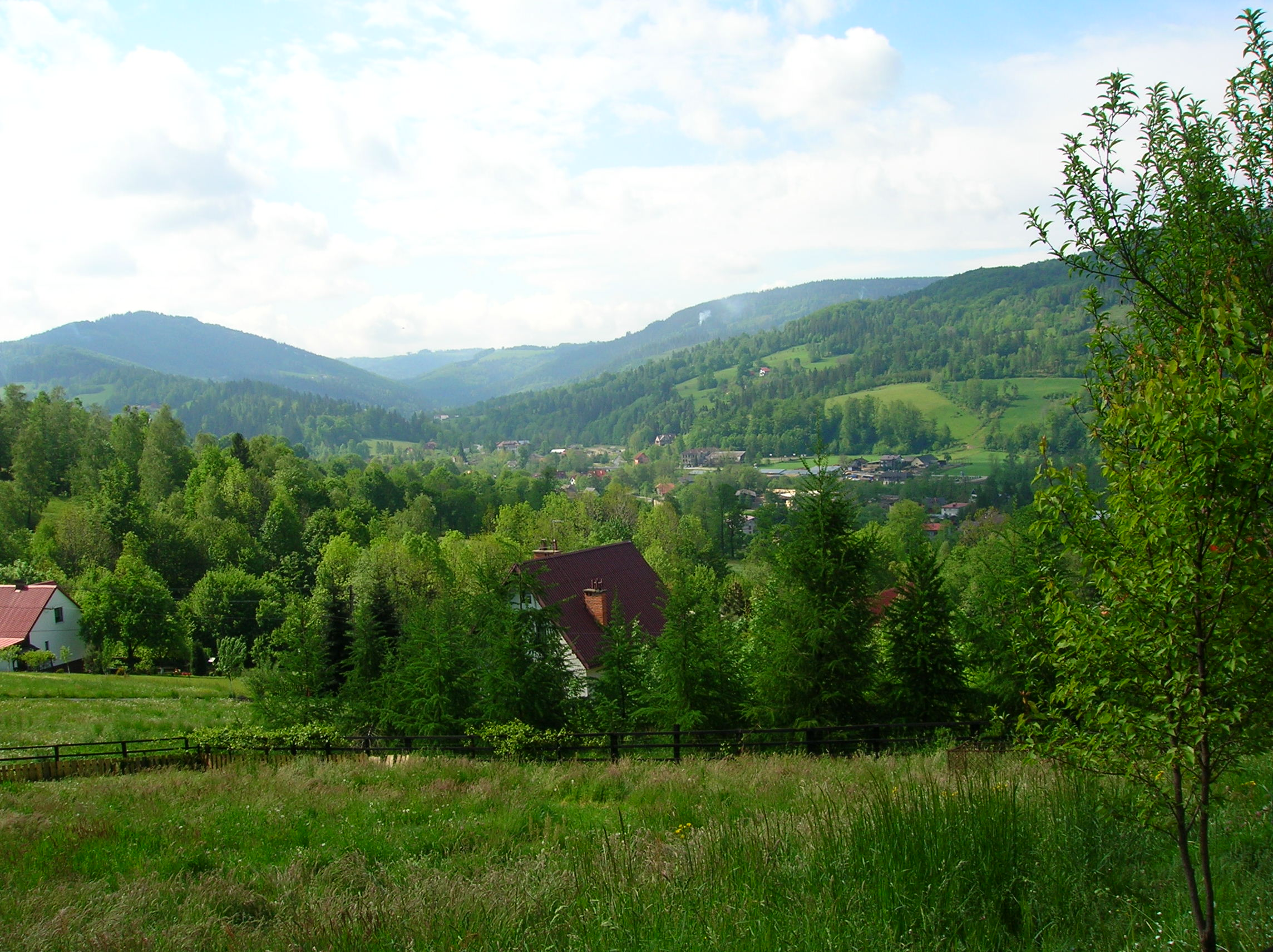 Brenna-1